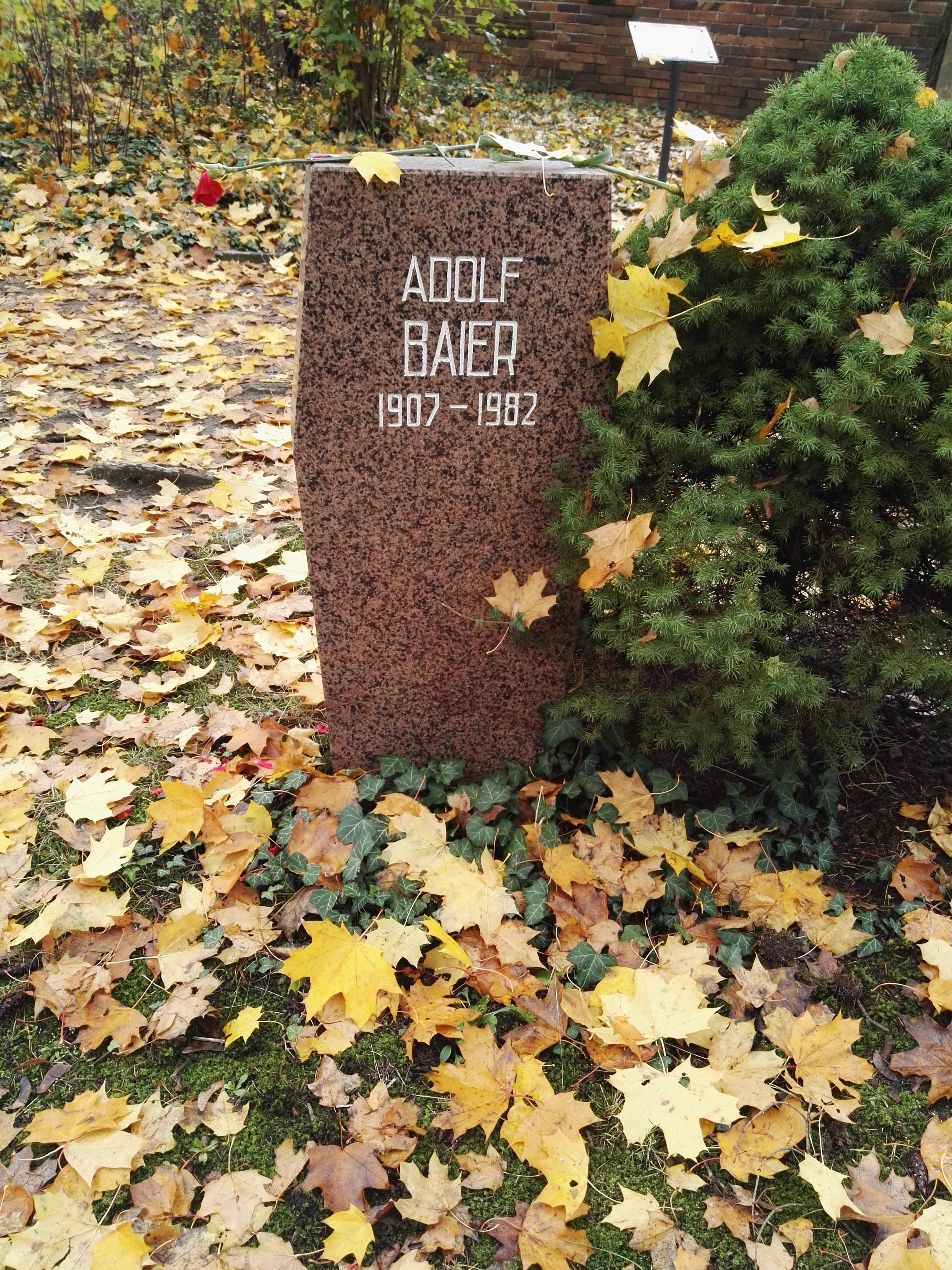 Grab von Adolf Baier auf dem Sozialistenfriedhof des Zentralfriedhofs Friedrichsfelde